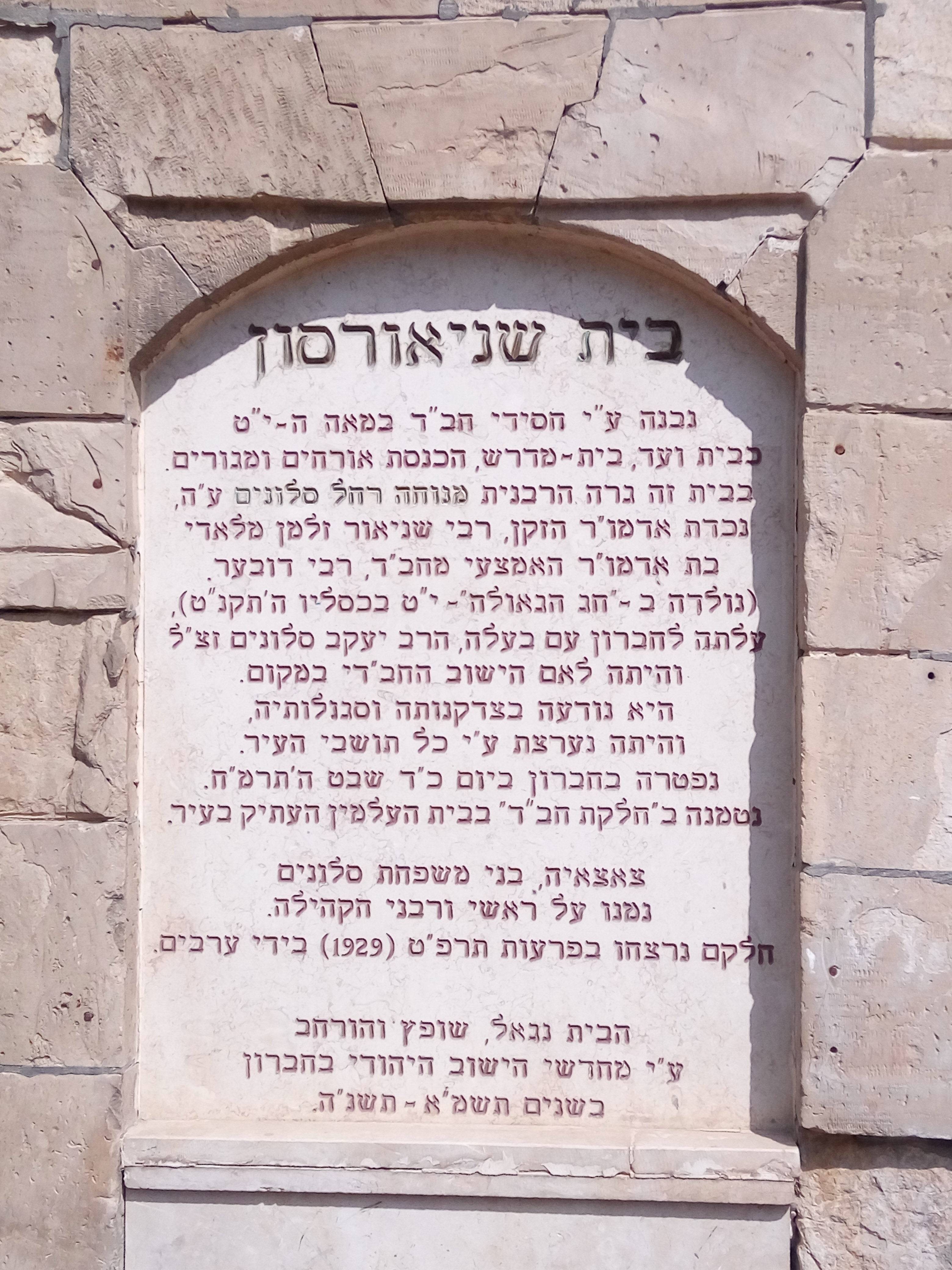 ביתה של מנוחה רחל סלונים בחברון, המכונה "בית שניאורסון"